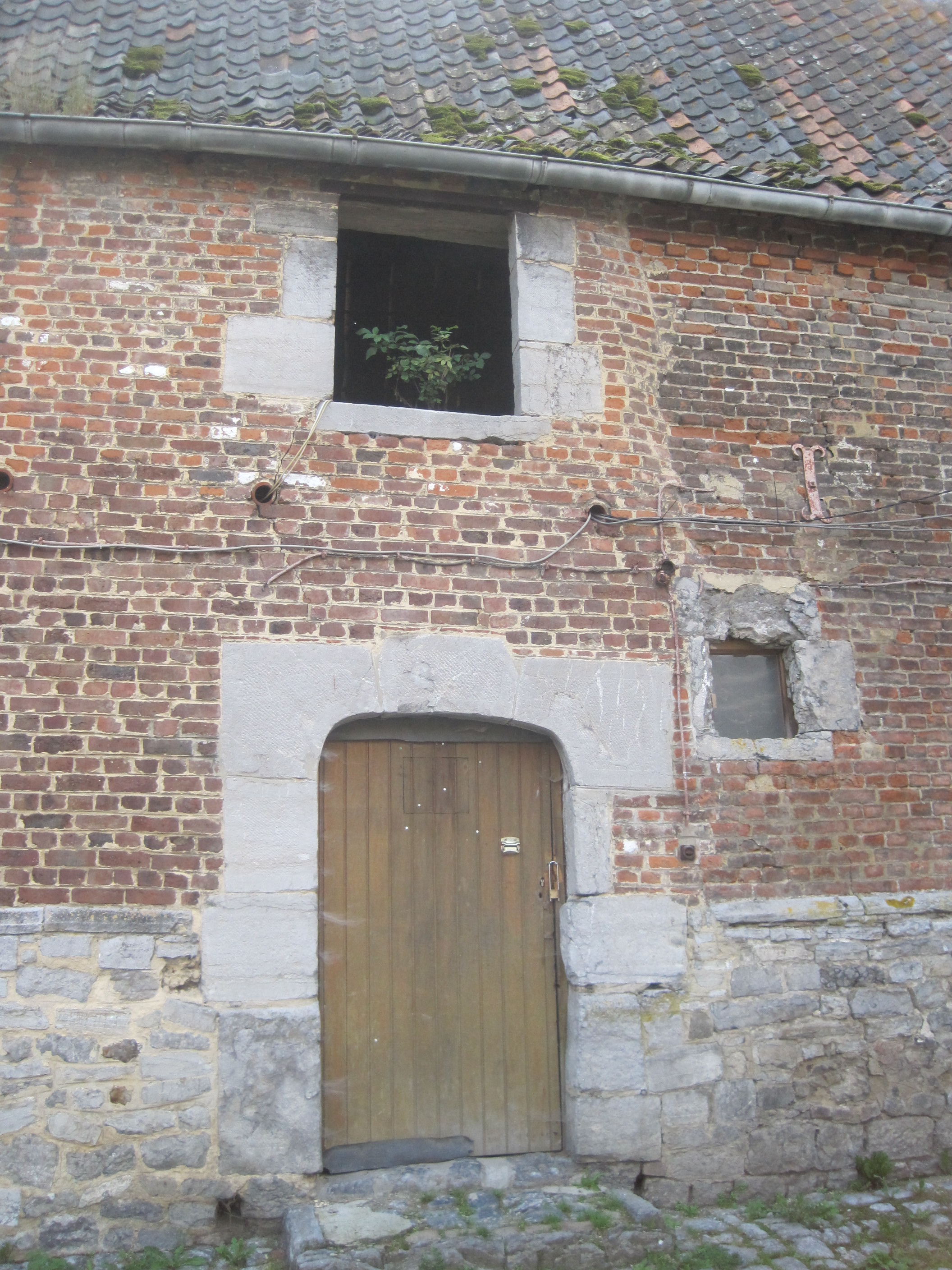 Ferme de la Grosse Tour